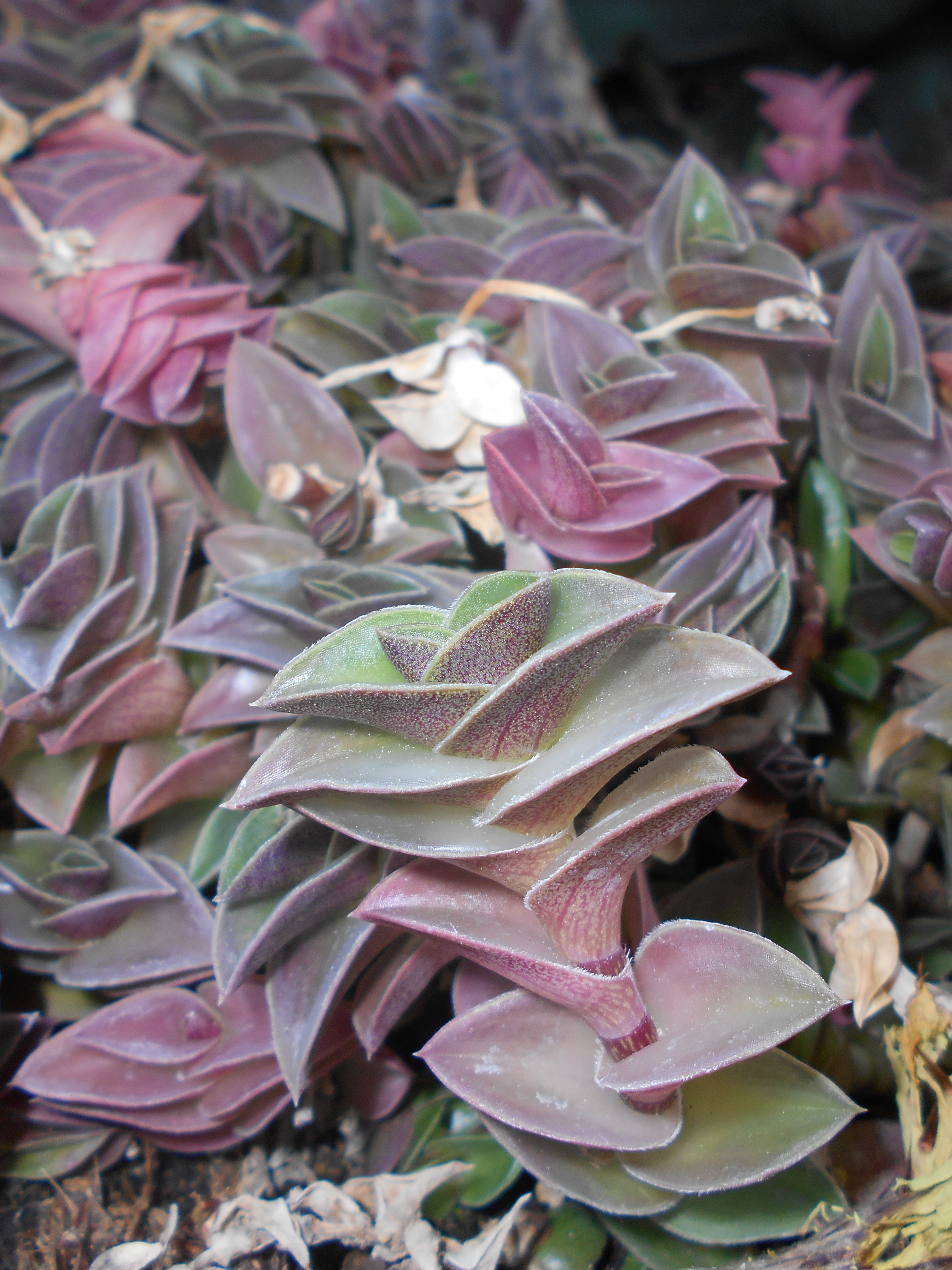 Tradescantia navicularis, Ogród Botaniczny Uniwersytetu Wrocławskiego.